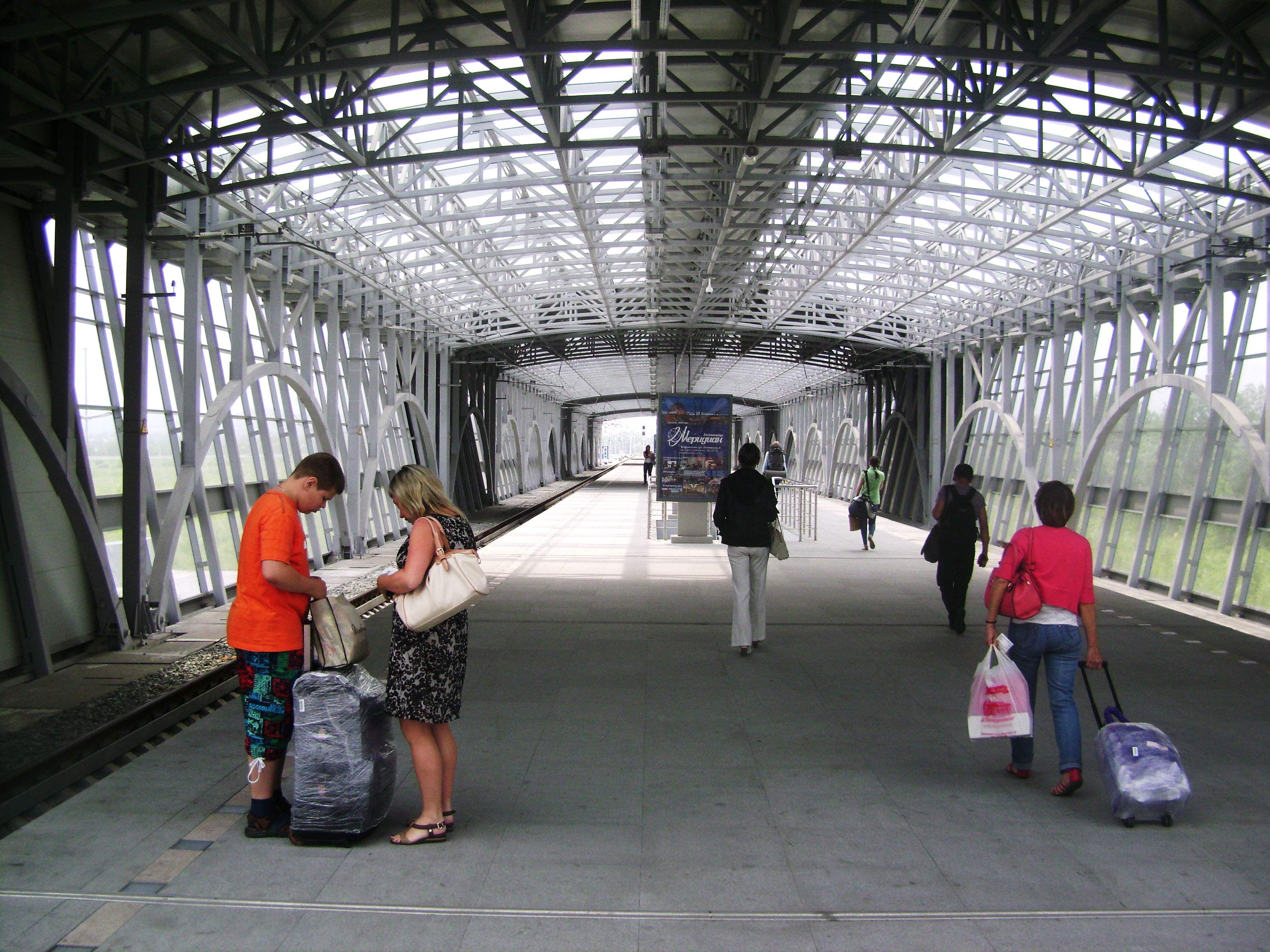 Аэропорт Кневичи (Владивосток). Перрон аэроэкспресса, 2013-07-09